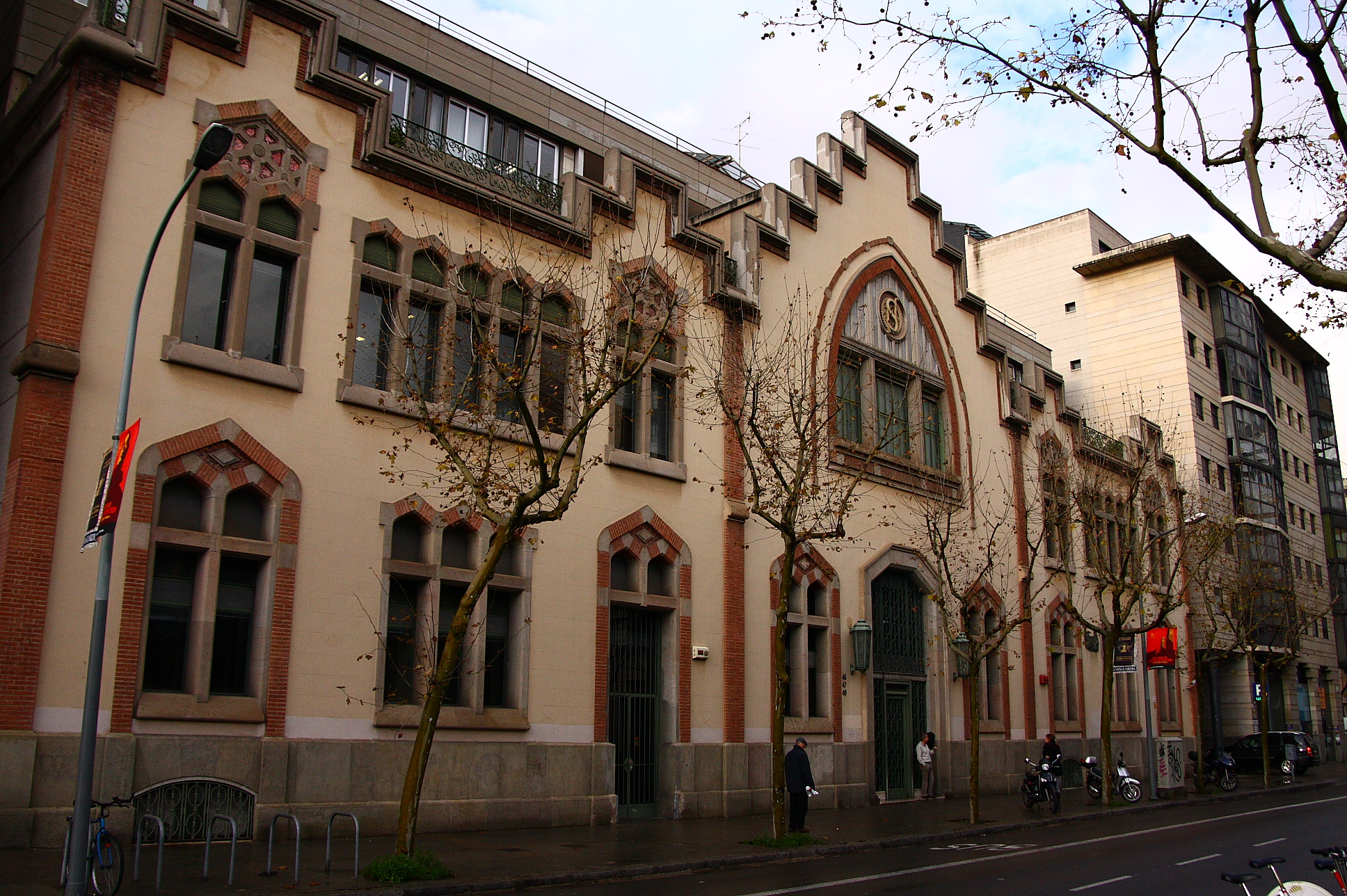 Editorial Salvat, obra modernista de 1916 de Pau Salvat i Espasa (Barcelona, 1872-1923).